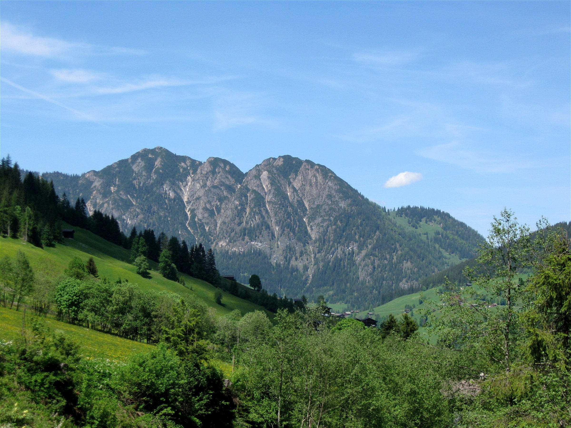 Gratlspitz, bei Alpbach, 1894 m